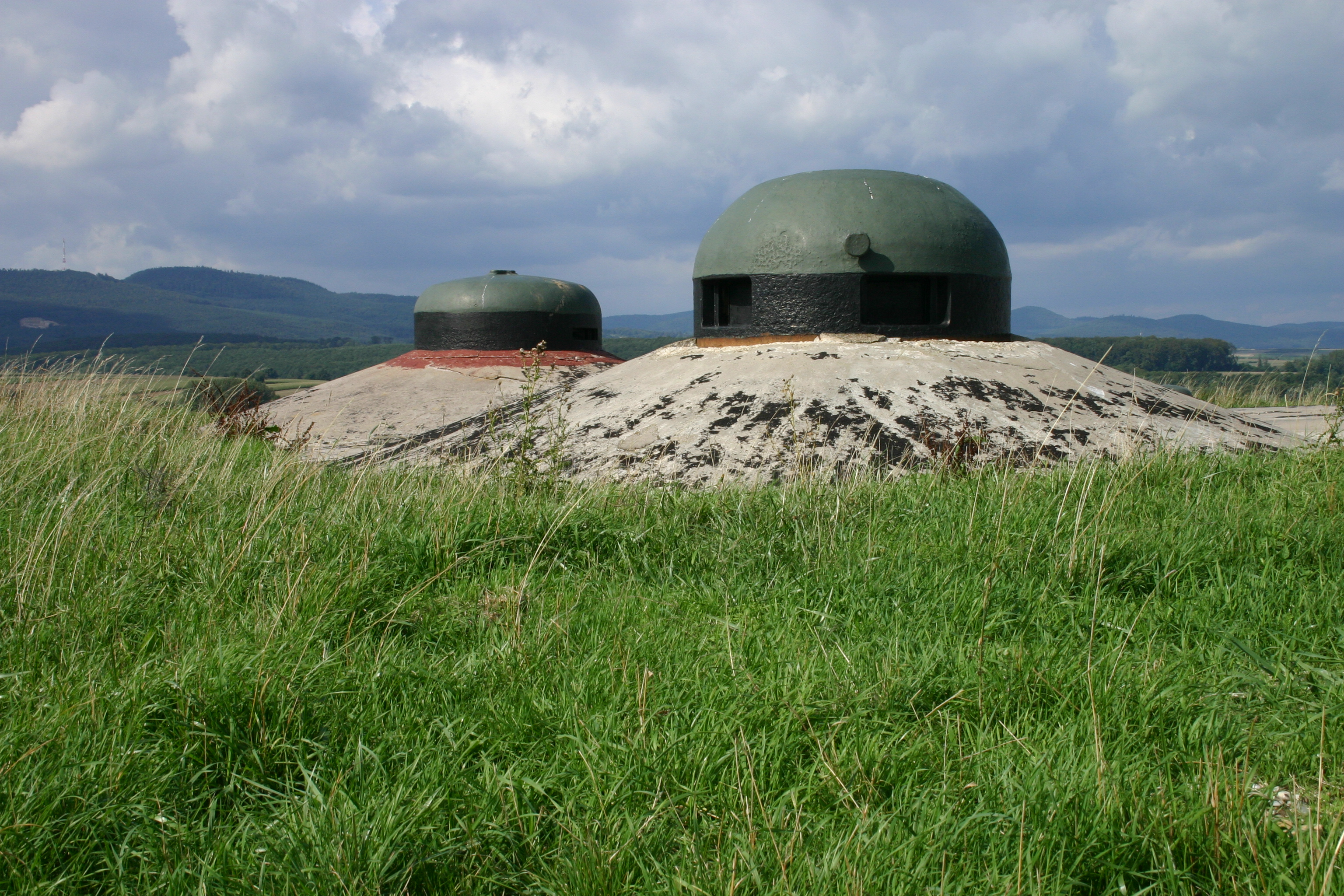 Türme Fort Schoenenbourg